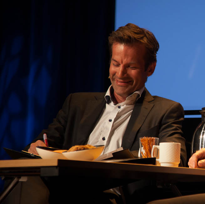 Nordiske Mediedager 2013